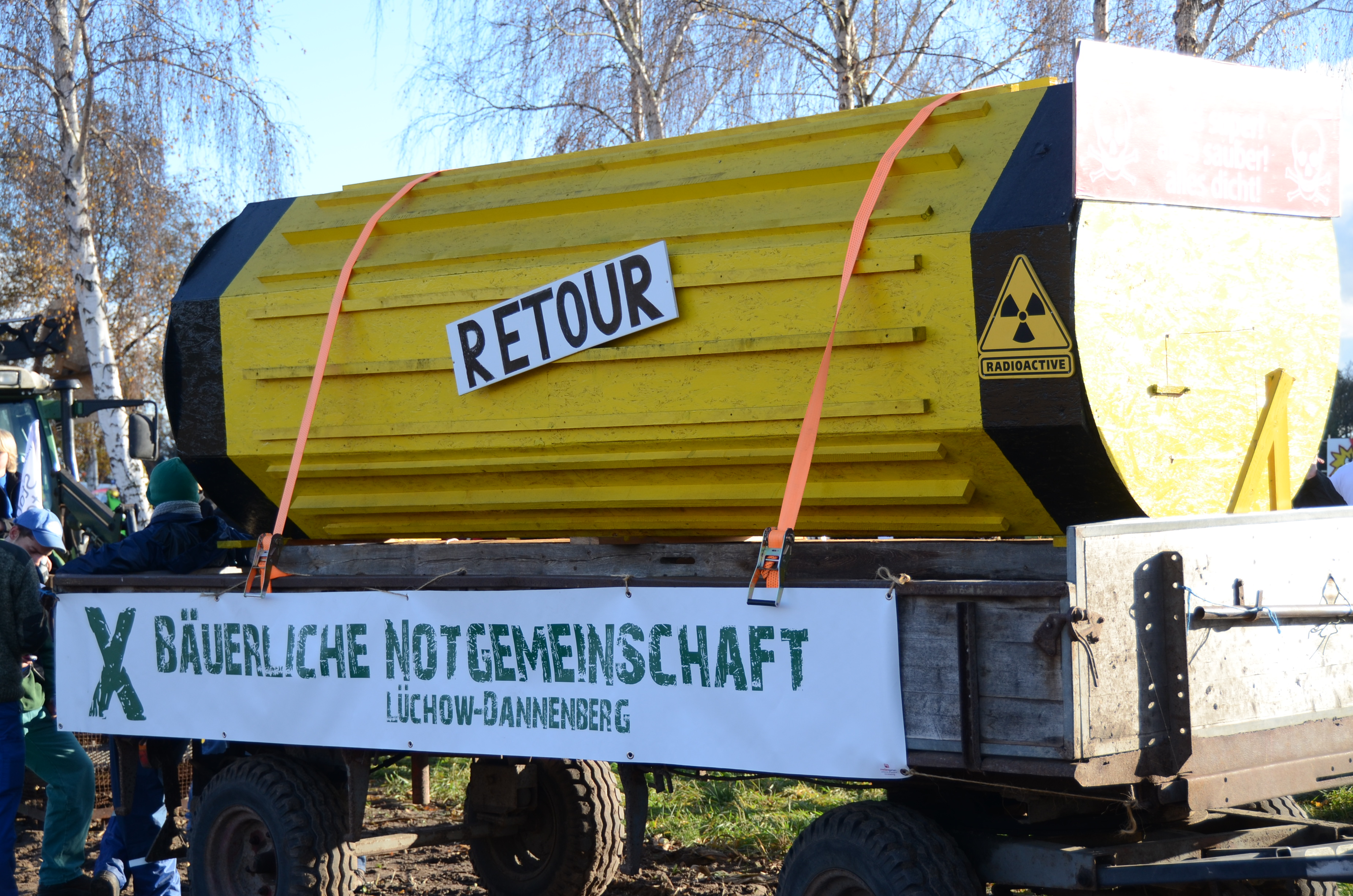 „Castor Retour“ auf einem Hänger der Bäuerlichen Notgemeinschaft Lüchow-Dannenberg bei der Anti-Castor-Demonstration in Gorleben am 6. November 2010